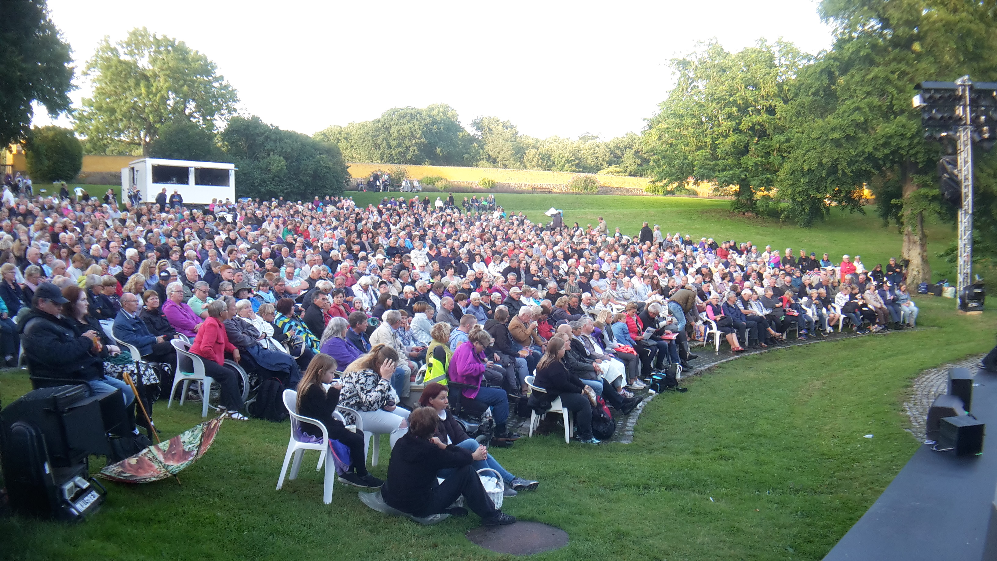 Publikum